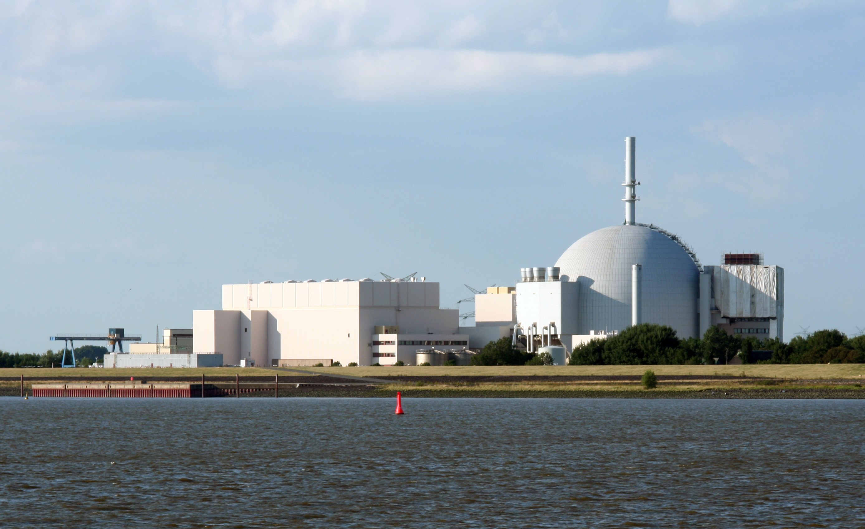 Atomkraftwerk Brokdorf von der Elbe aus gesehen